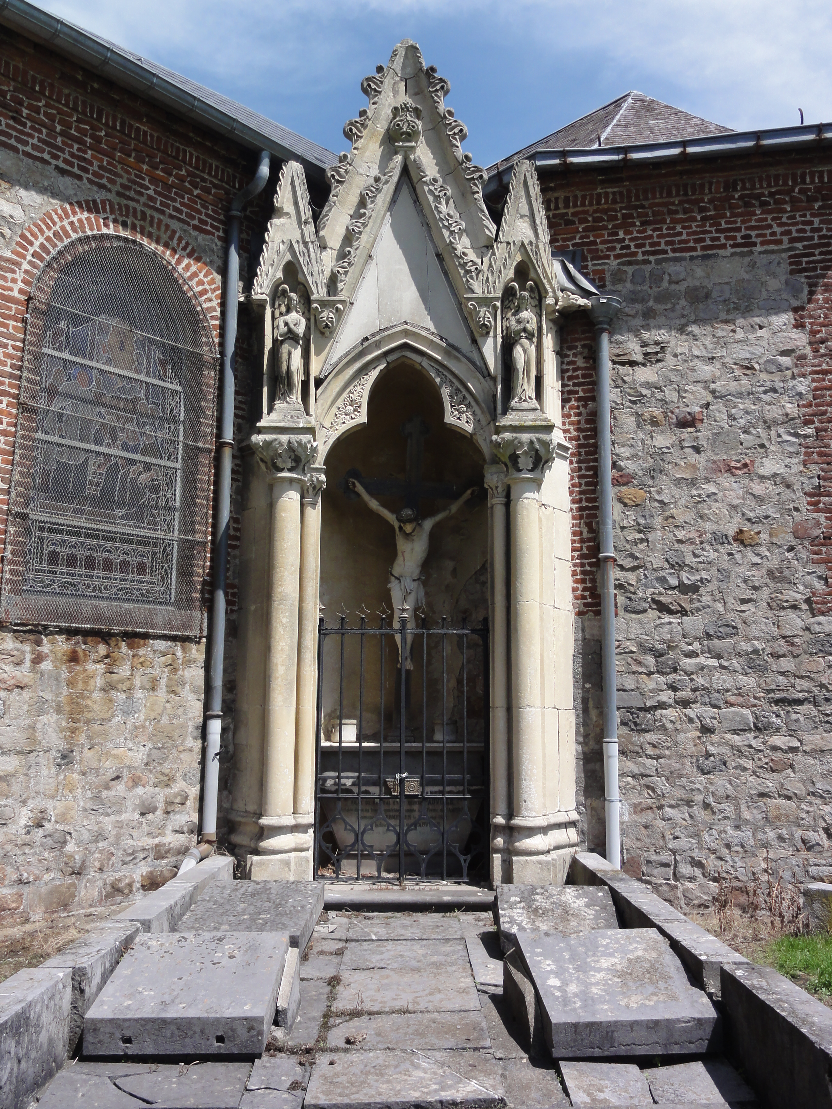 Saint-Waast-la-Vallée (Nord, Fr) tombe avec calvaire